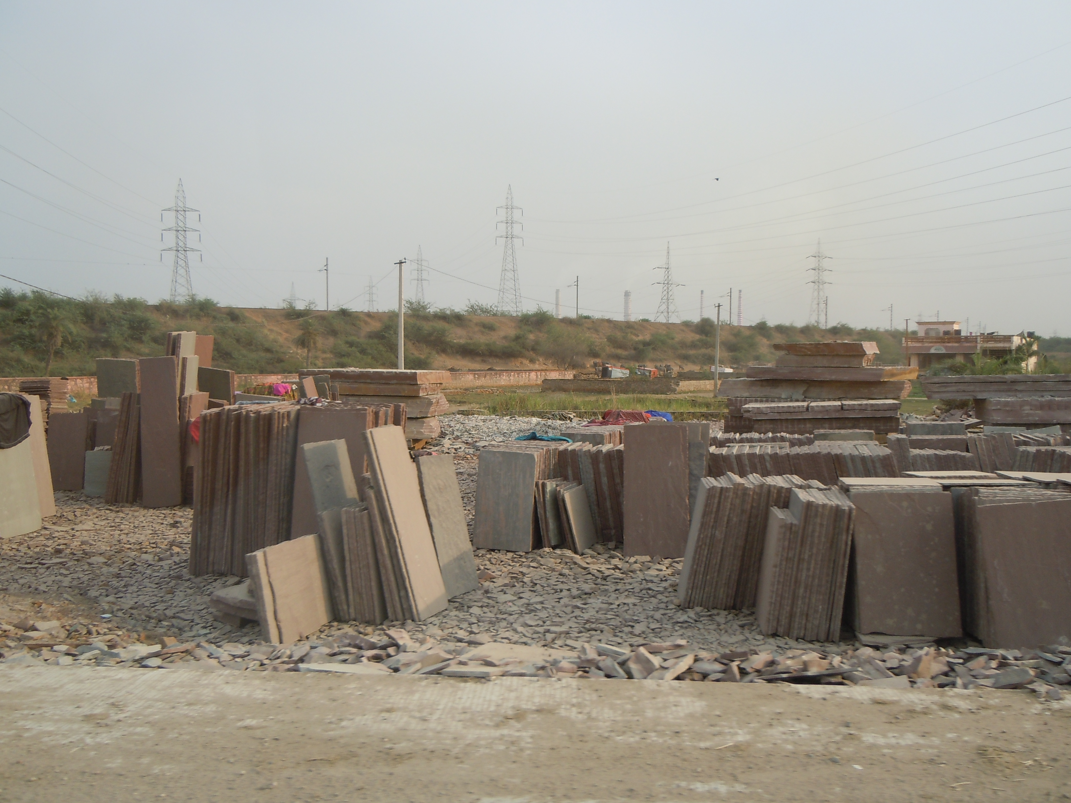 Aire de stockage de pierre de Kota (Kota Stone) sur le site de production à Kota, Rajasthan